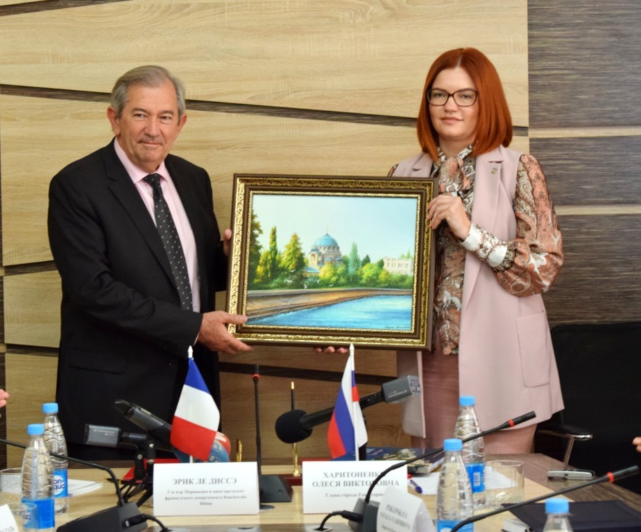 Российская Евпатория во главе с Олесей Харитоненко и французский Мариньян во главе с мэром города Эриком Лье Диссэ подписали соглашение и стали побратимами. На подписании соглашения об установлении побратимских связей присутствовали депутаты Государственной Думы РФ Руслан Бальбек и Наталья Поклонская, глава администрации Евпатории Андрей Филонов, председатель Контрольно-счетной палаты города Наталья Кудеревко, депутаты горсовета, общественники и почетные жители города. Французскую сторону представляли вице-мэр Мариньяна по вопросам образования и воспитания детей раннего возраста госпожа Вероник Прадэль и глава представительства ДНР во Франции господин Юбер Файяр.